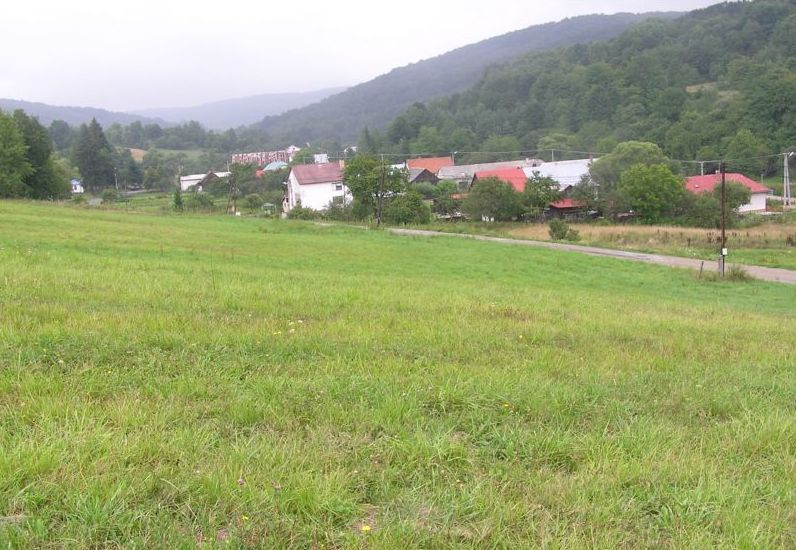 Celkový pohľad